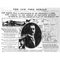 La prima pagina del Ney York Herald con la notizia del raggiungimento del Polo Nord da parte del Dr. Cook